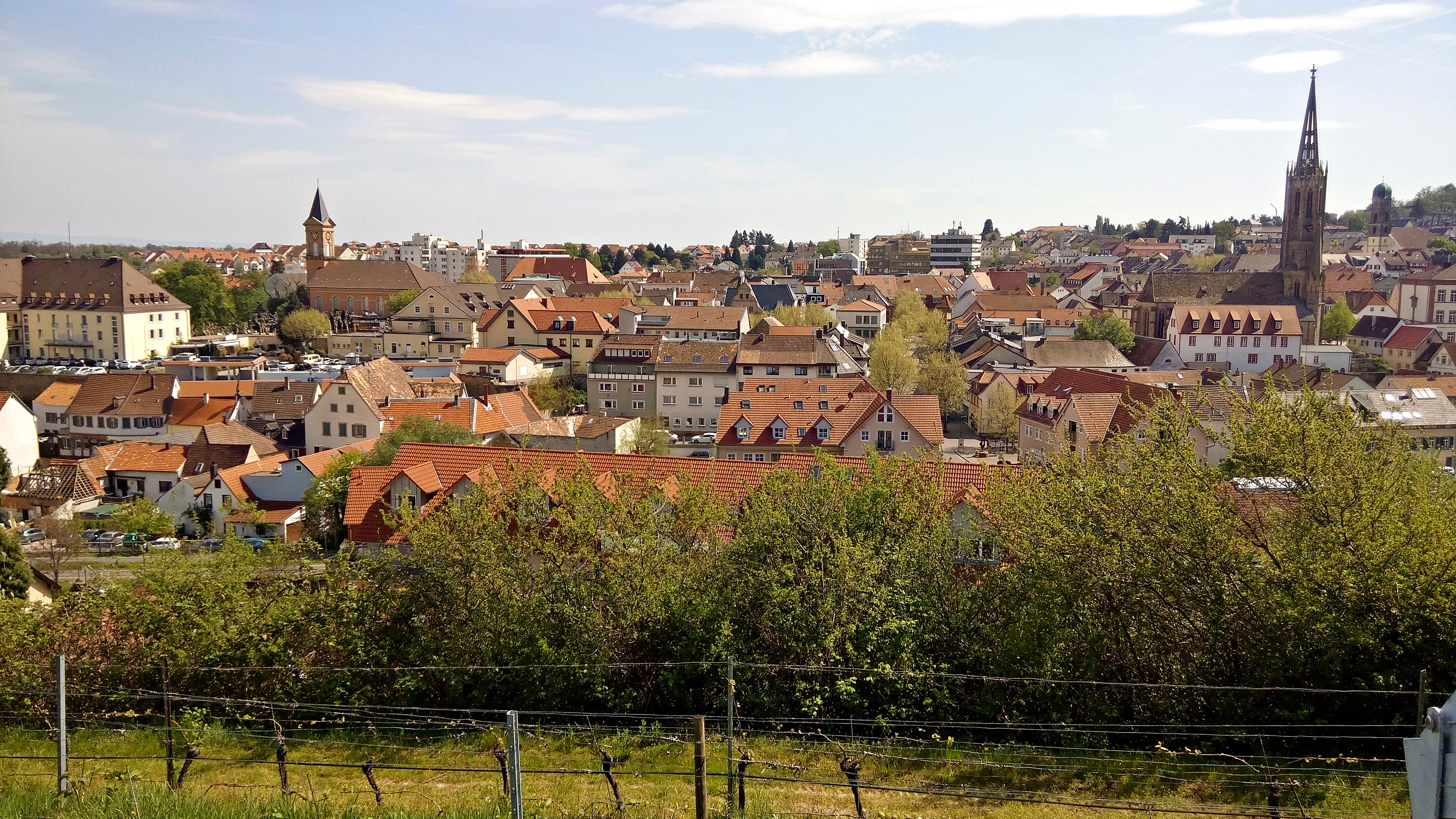 Bad Dürkheim, Ansicht vom Vigilienturm aus